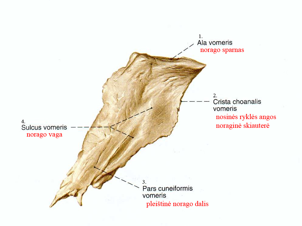 Vienas iš veido kaulų